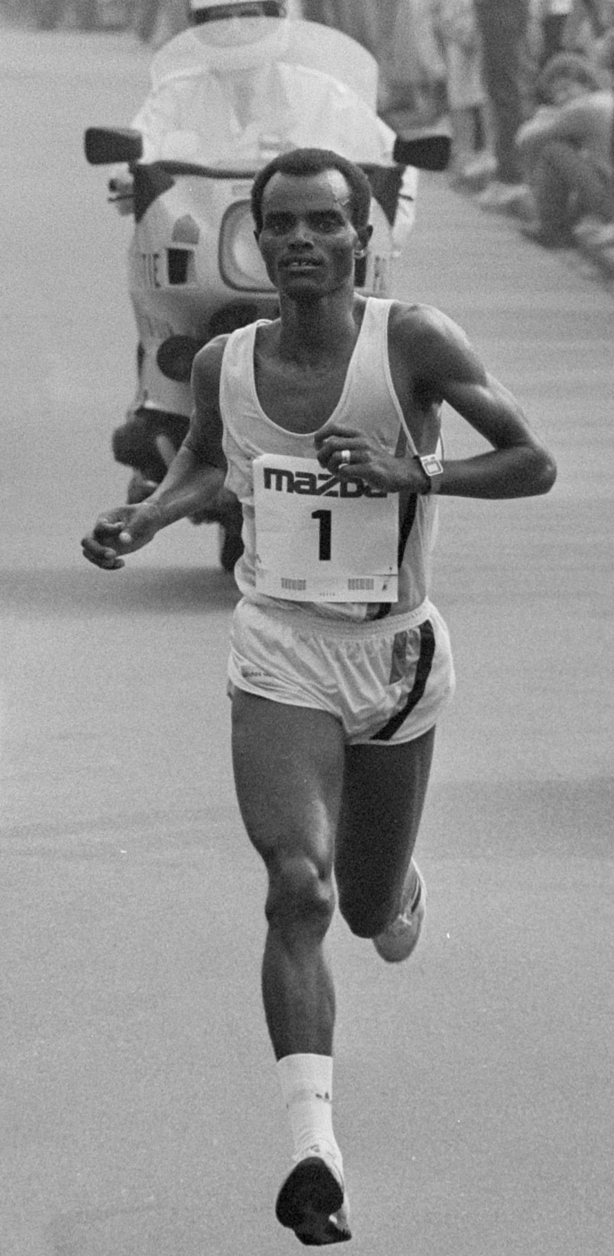 Marathon van Rotterdam; winnaar Densamo bij de finish.